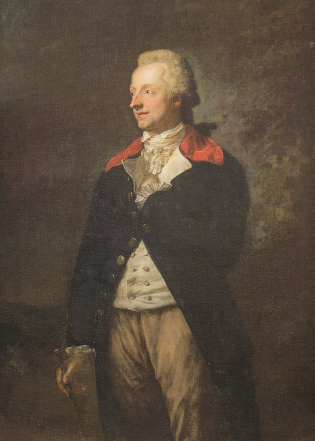 Johann Georg Friedrich Freiherr von Friesen. Gemälde von Anton Graff. Öl auf Leinwand